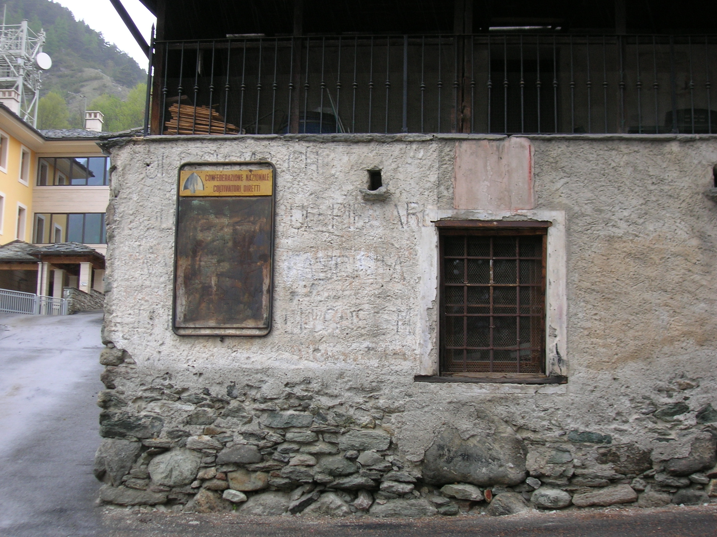 Dettaglio iscrizione, casaforte La Tour, Valpelline, Valle d'Aosta, Italia.